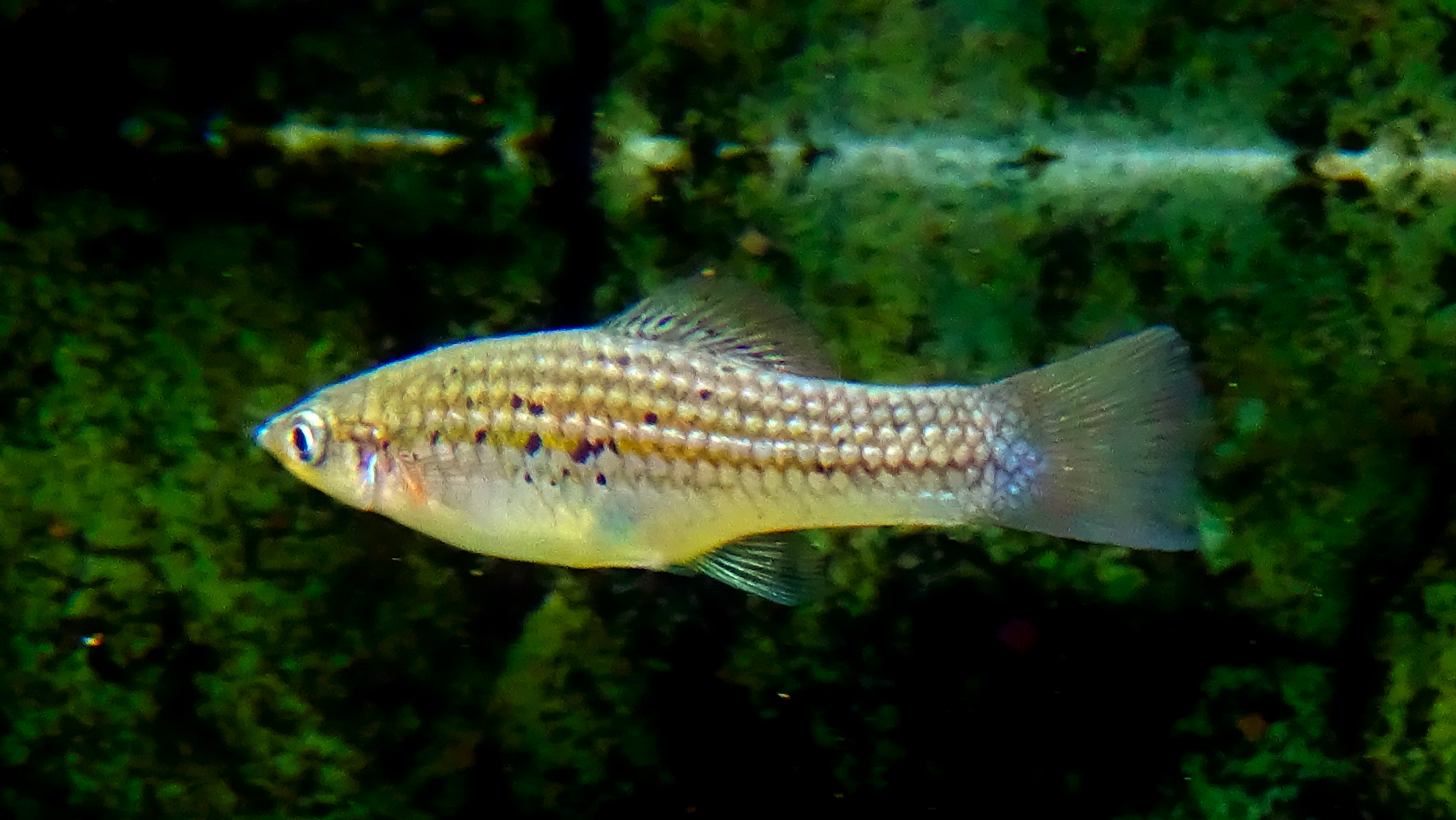 Xiphophorus montezumae (femelle) - Aquarium Tropical du Palais de la Porte Dorée - Paris/France - 29/04/2015